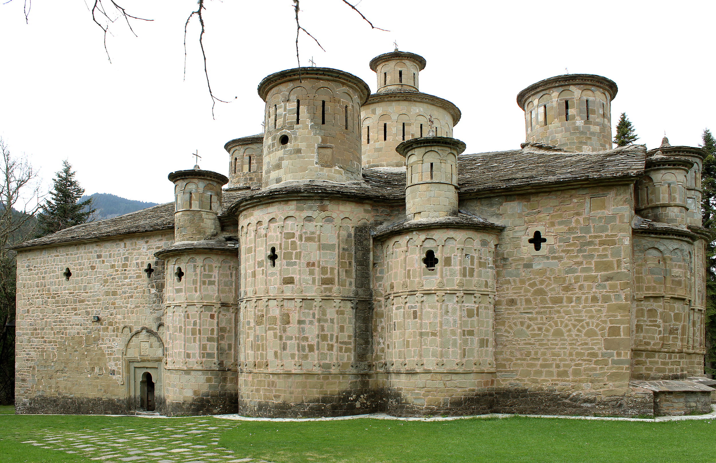 Ναός του Τιμίου Σταυρού κοντά στο χωριό Δολιανά. Χαρακτηριστικό του οι πολλοί τρούλοι. This is a photography of Natura 2000 protected area with ID GR1440001